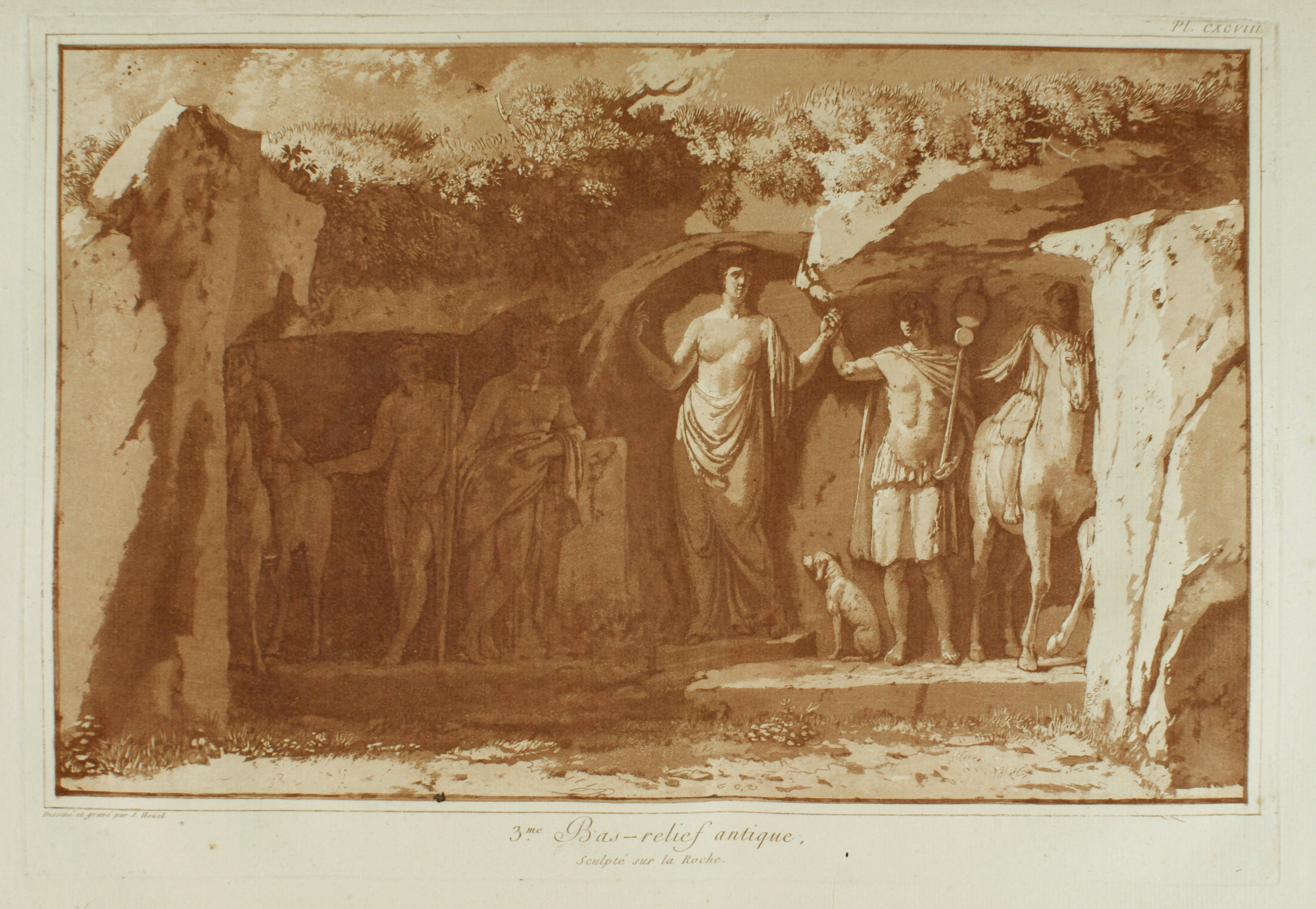 Santuario Rupestre di Akrai raffigurato da J. Houel